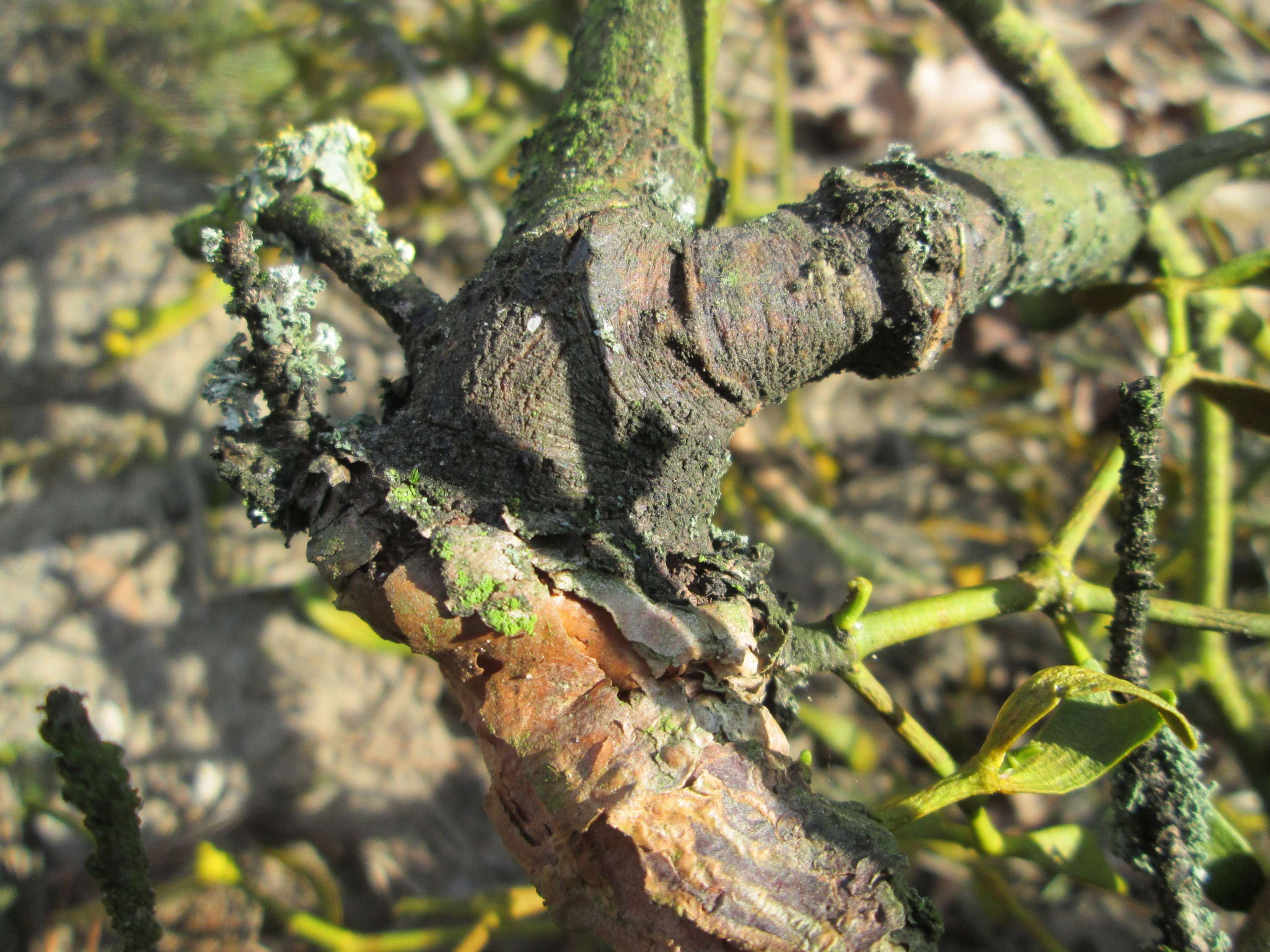 Weißbeerige Mistel (Viscum album) auf dem Feldherrenhügel im Naturschutzgebiet „Oftersheimer Dünen“